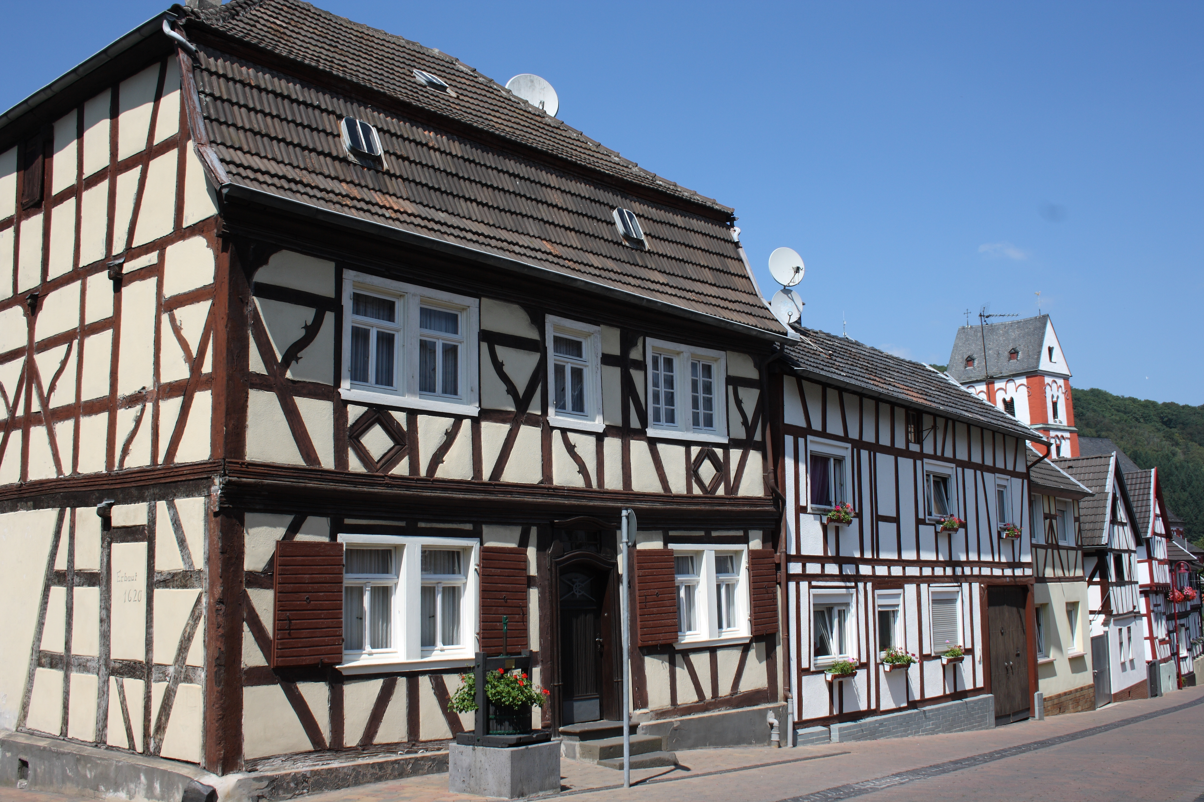 Fachwerkhaus in Oberbreisig, Stadtteil von Bad Breisig, Hauptstraße 20